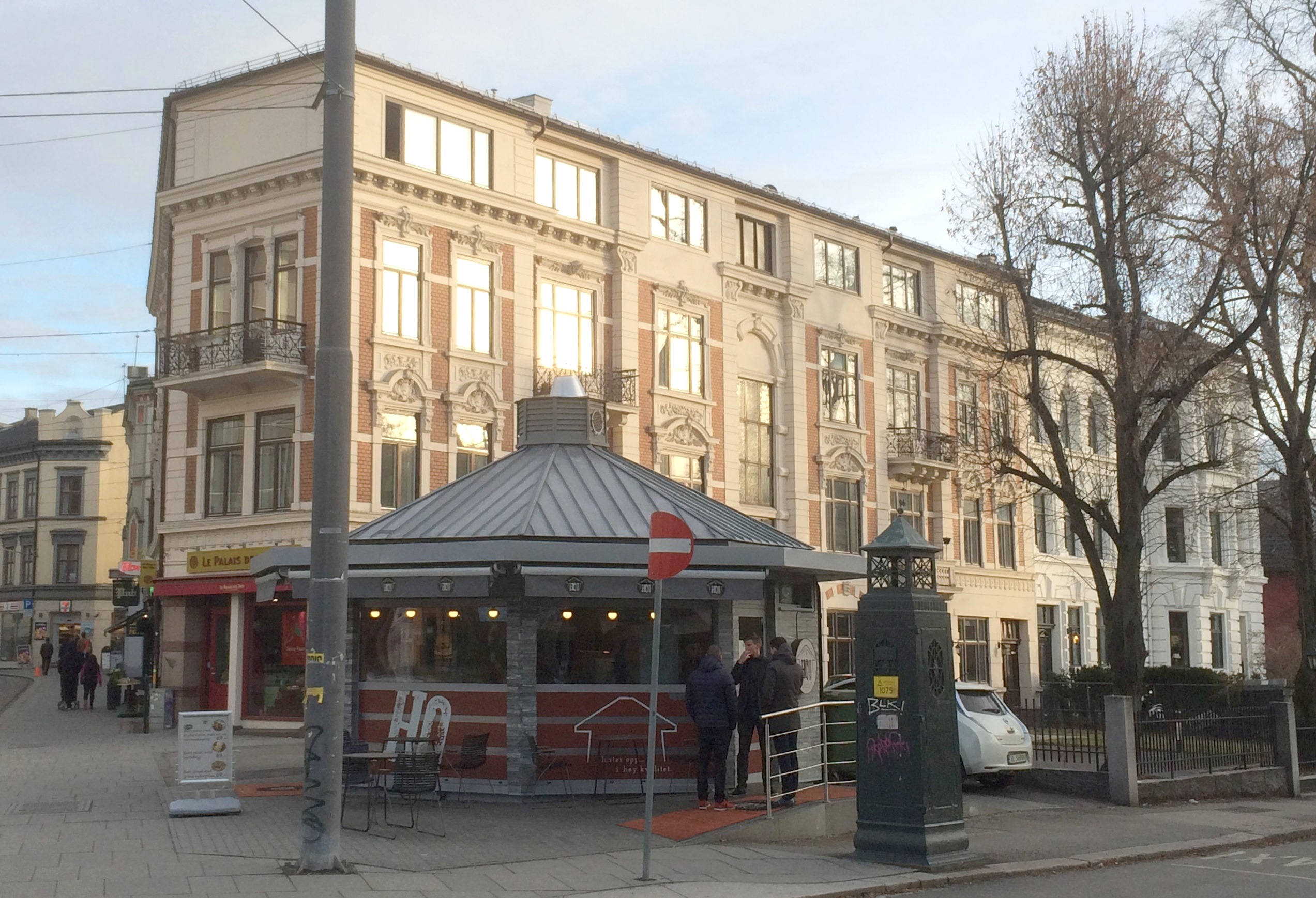 Hegdehaugsveien 32. Arkitekt: Julius Foseid (1897).